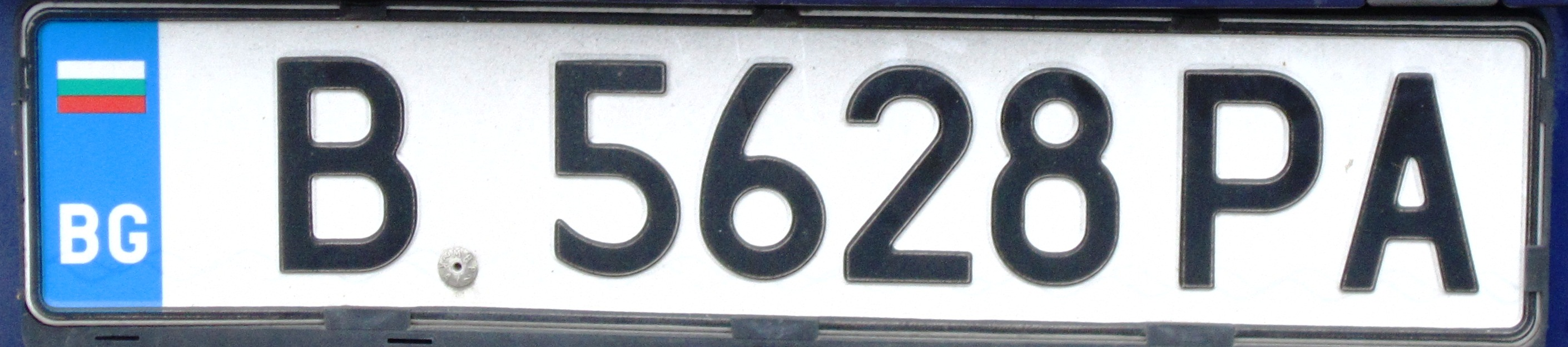 oude kentekenplaat Bulgarije